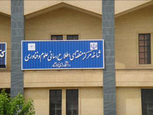 Branche-kermanshah